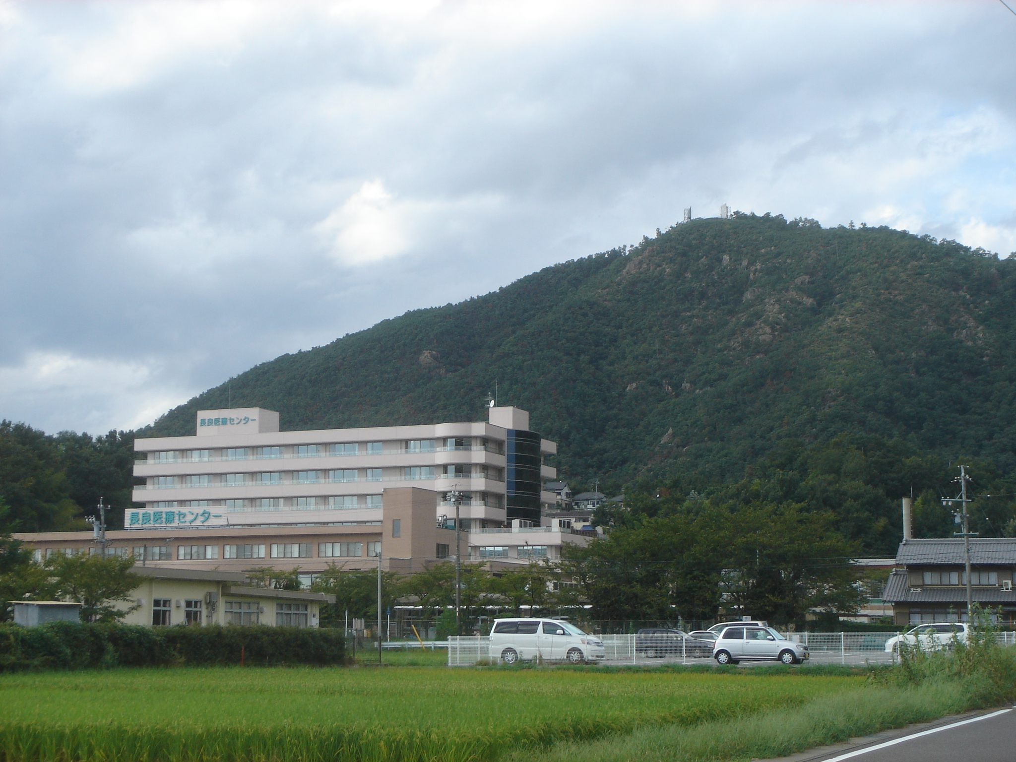 Nagara Medical Center in Gifu Pref.（独立行政法人国立病院機構長良医療センター）,Gifu,Gifu,Japan(岐阜県岐阜市)で撮影。